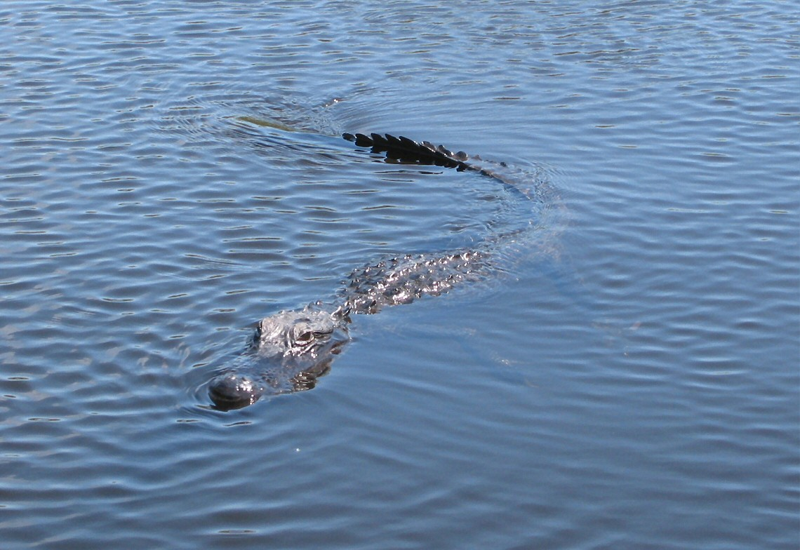 Everglades/Florida in den Everglades/Florida